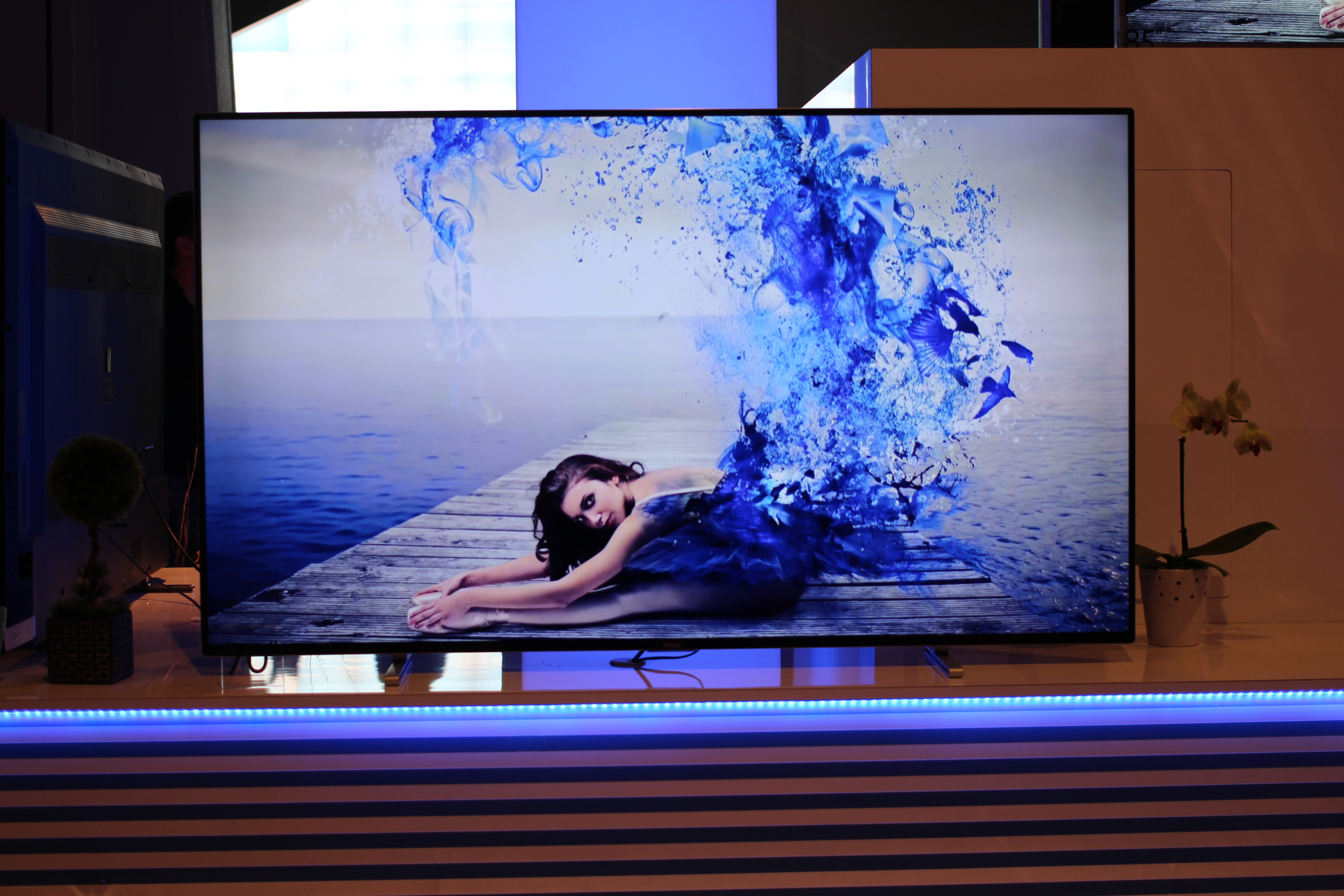 Haier 55” OLED Tv